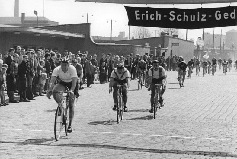 E. Hancke, S. Köhler, W. Schmelzer Zentralbild Wendorf 24.4.1966 Berlin: 9. Erich-Schulz-Gedenken - Straßenrennen Berlin-Angermünde-Berlin am 24.4.1966 (168 km) Drei Bahnspezialisten machten den Sieg unter sich aus. Vorn gewinnt den Spurt Erhars Hancke (SC Leipzig). Dahinter Siegfried Köhler (2.Platz) und Wolfgang Schmelzer (3. Platz, beide TSC Berlin)